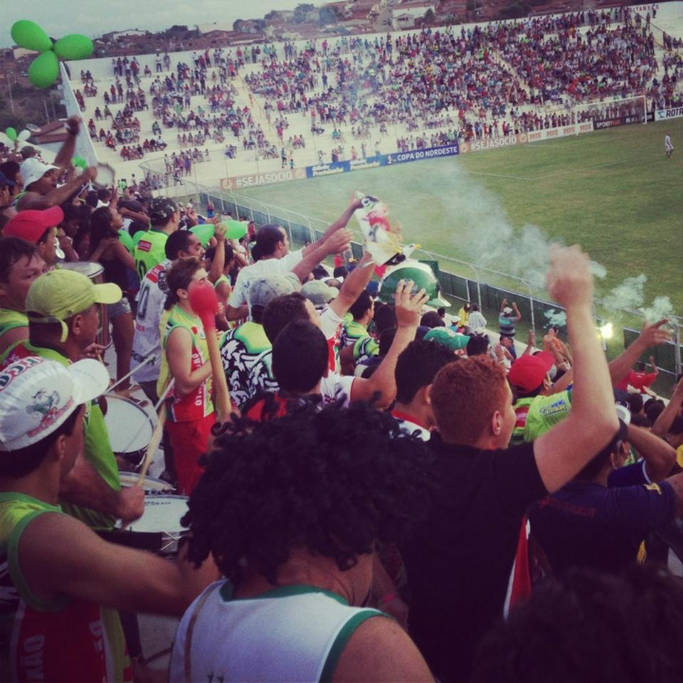 Torcedor no Estadio do Salgueiro